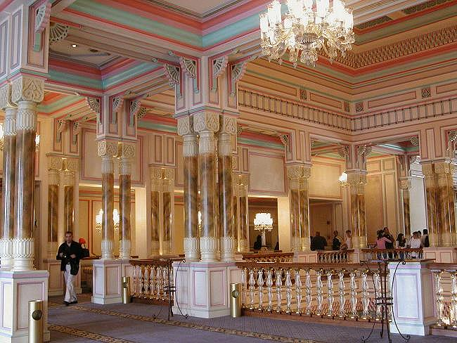 Große Halle im Ciraghan Palast